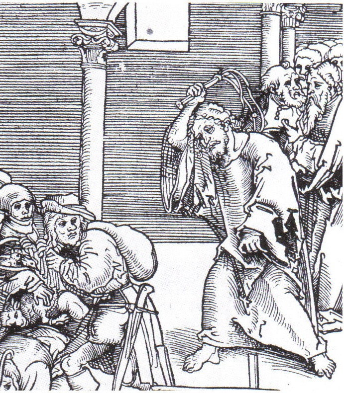 Jesús expulsa a los fariseos del Templo